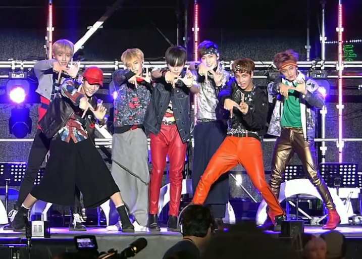 2016년 8월 20일 부산 현인가요제에서 NCT 127